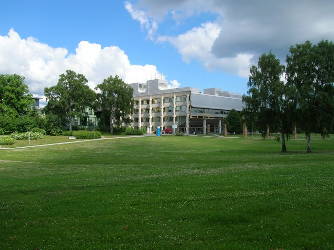 Arrheniuslaboratoriet, Stockholms universitet Stockholm, Sweden.